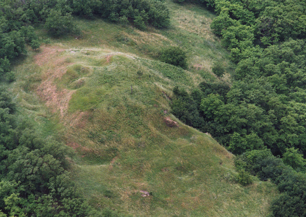 Kemeni vár - Kemendollár - Hungary - Europe